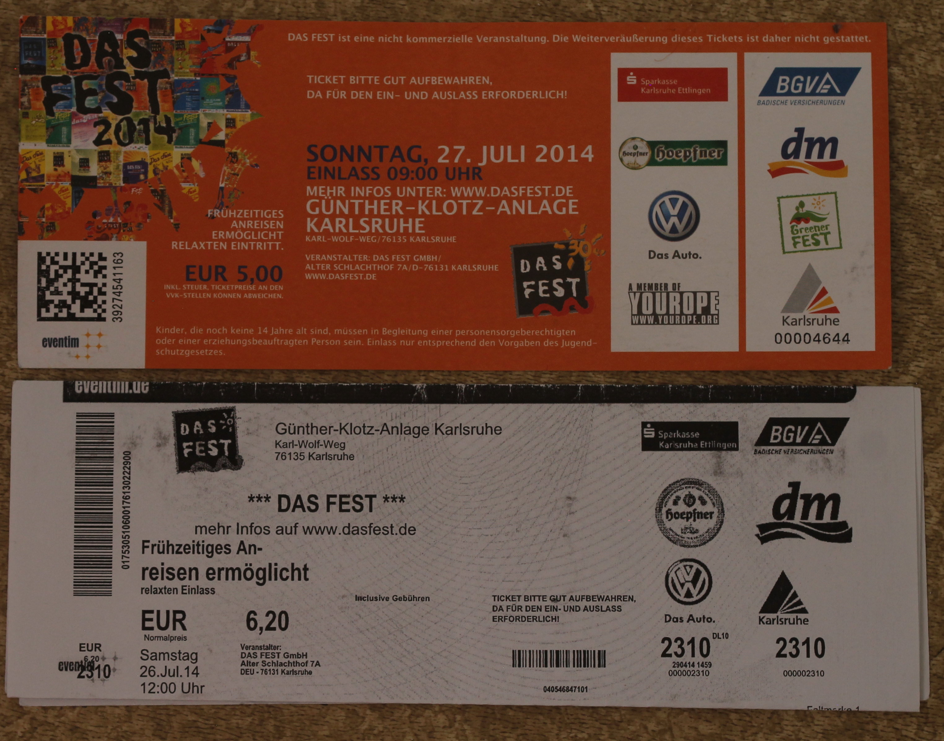 Vorderseite zweier Tickets für das "Fest" in Karlsruhe am 27. Juli 2014